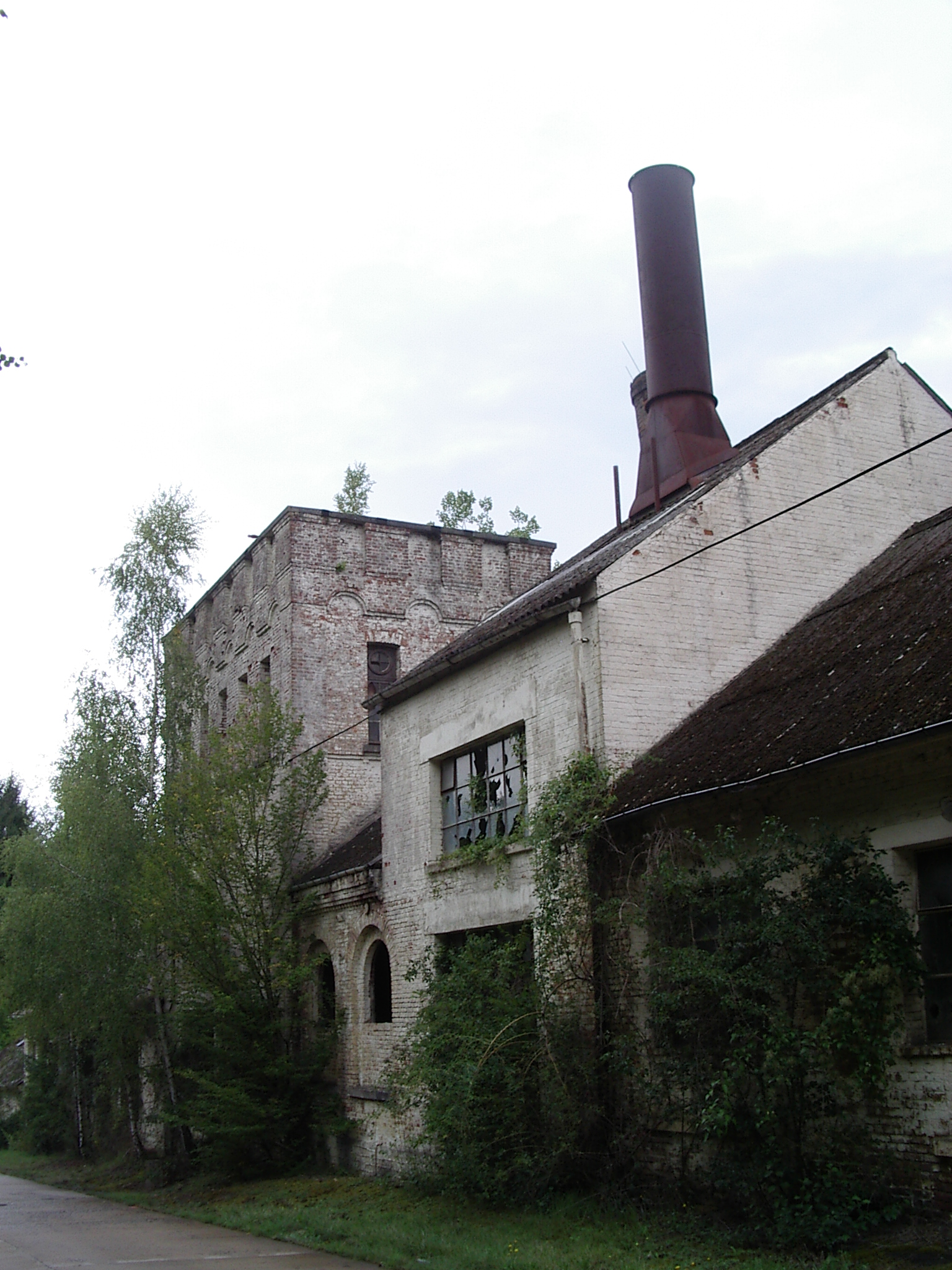 PMB, vestiges des anciennes Dynamiteries de Matagne-la-Grande, construite en 1879 et devenue par la suite Poudrières Réunies de Belgique. Ce complexe de bâtiments en brique d'inspiration néo-classique est dominé par une sorte de tour néo-médiévale.